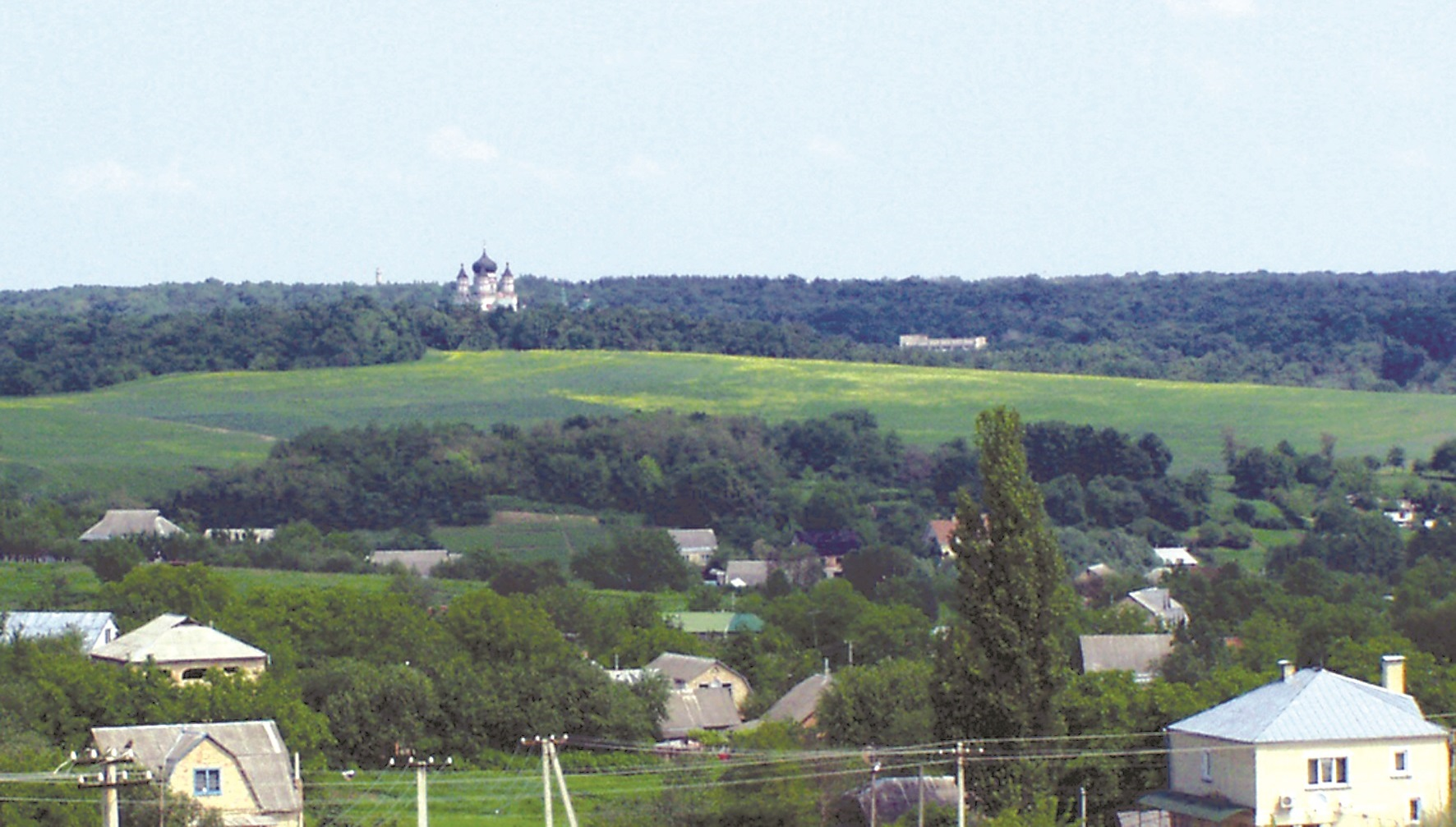 Вид з Хотова на Хотівське городище скіфських часів (VI - IV ст. до н.е.), фото 2008 р.